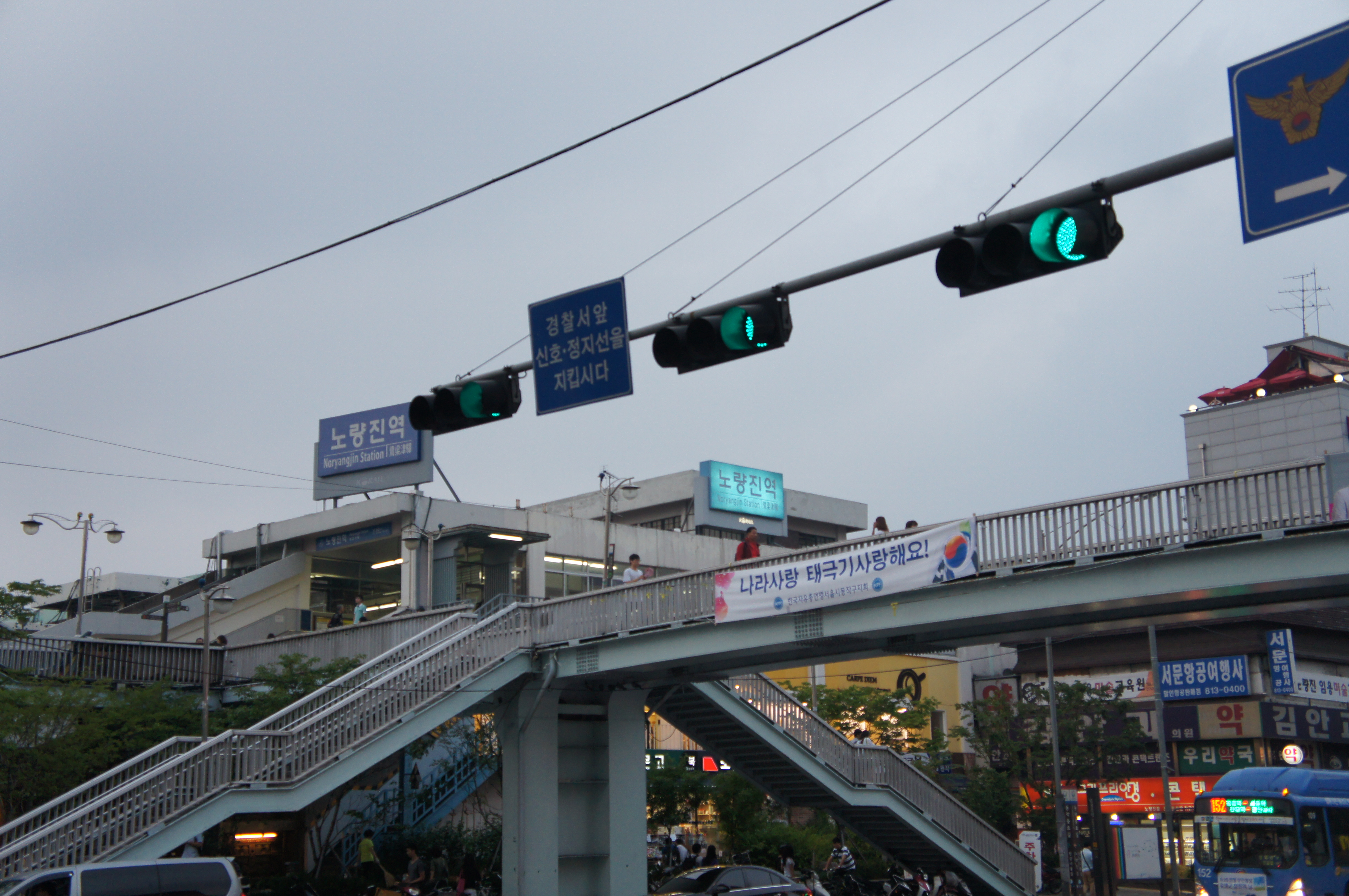 경부선 노량진역사